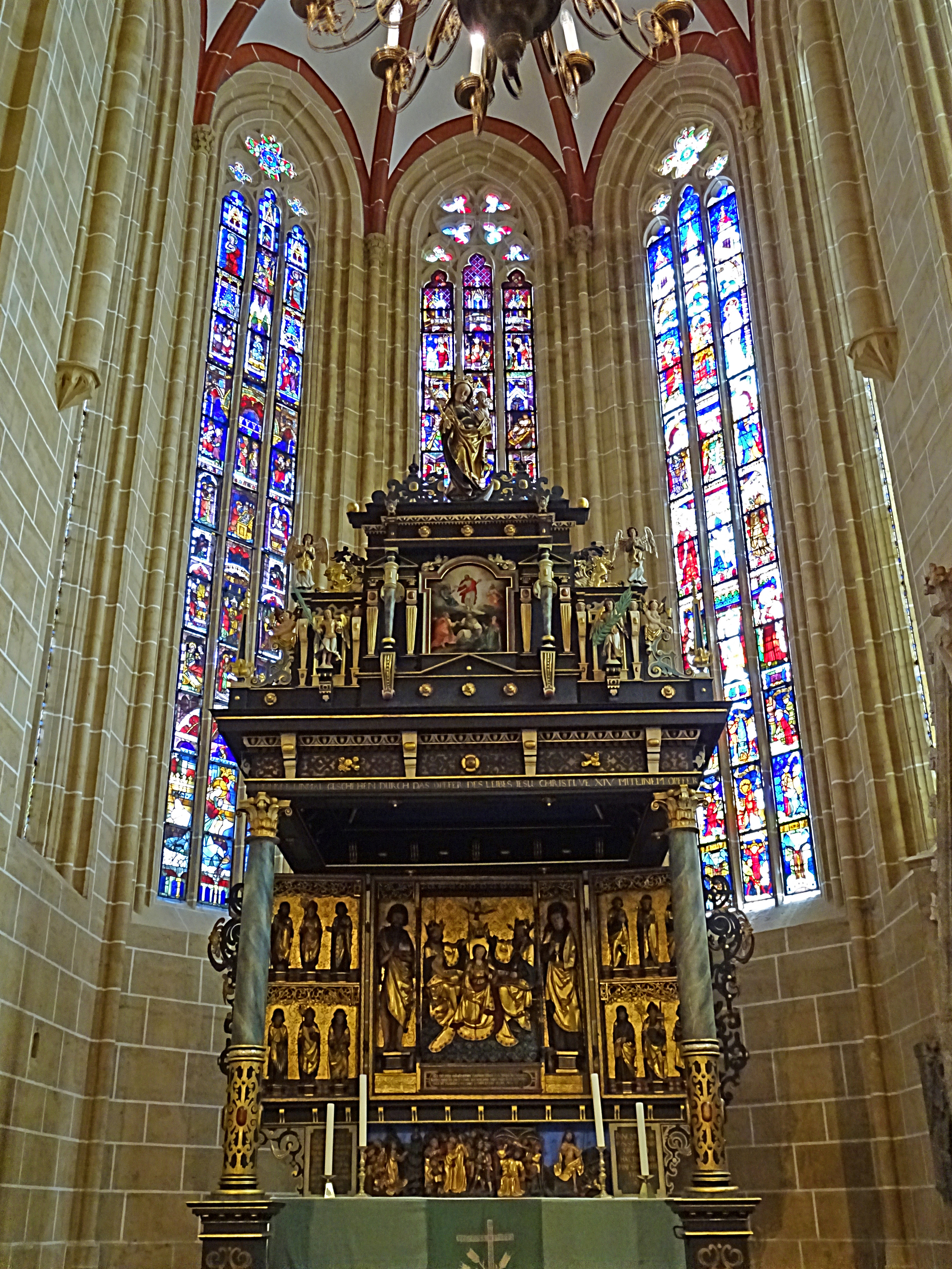 Hochaltar mit Renaissance-Baldachin (1608) und Chorfenster in der Marienkirche (Mühlhausen)